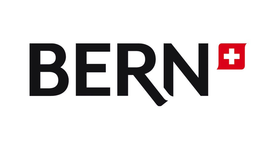 le logo de l'office de tourisme de Berne.